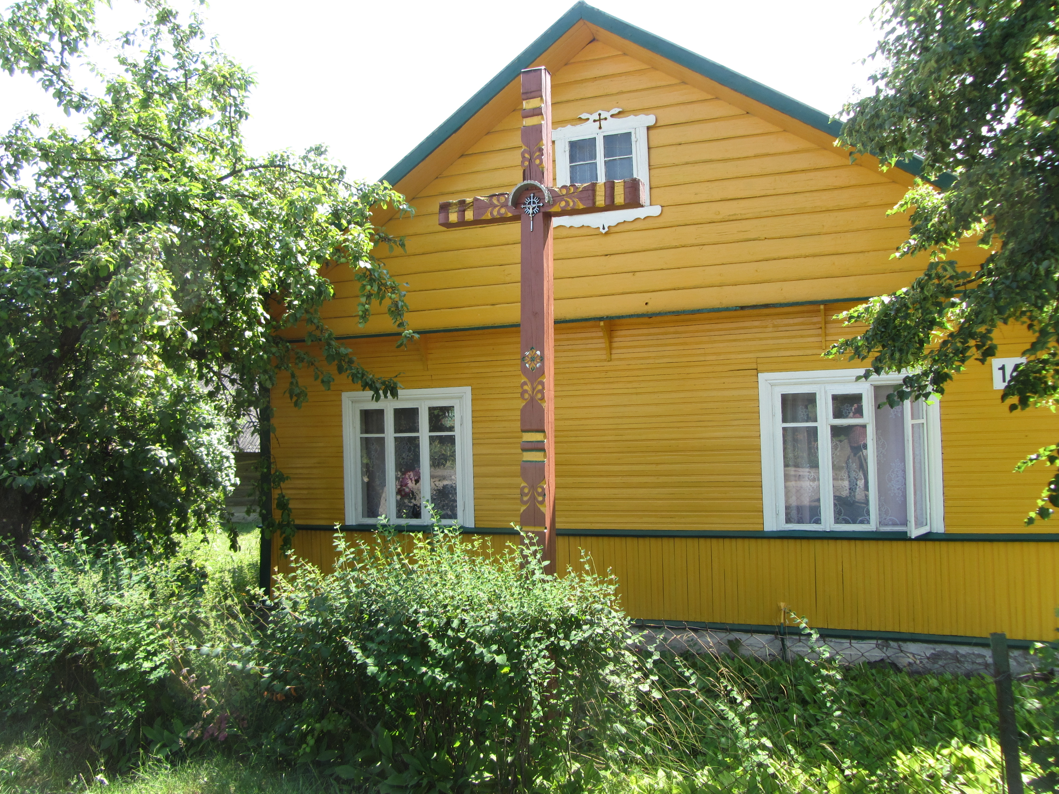 Švendubrė 66444, Lithuania